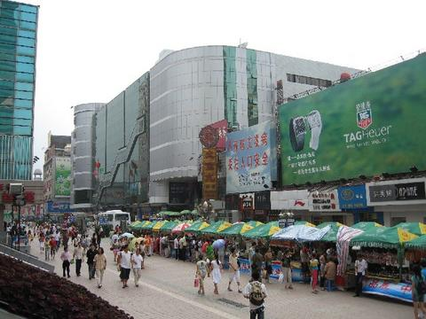 Shenyang - Zhong jie